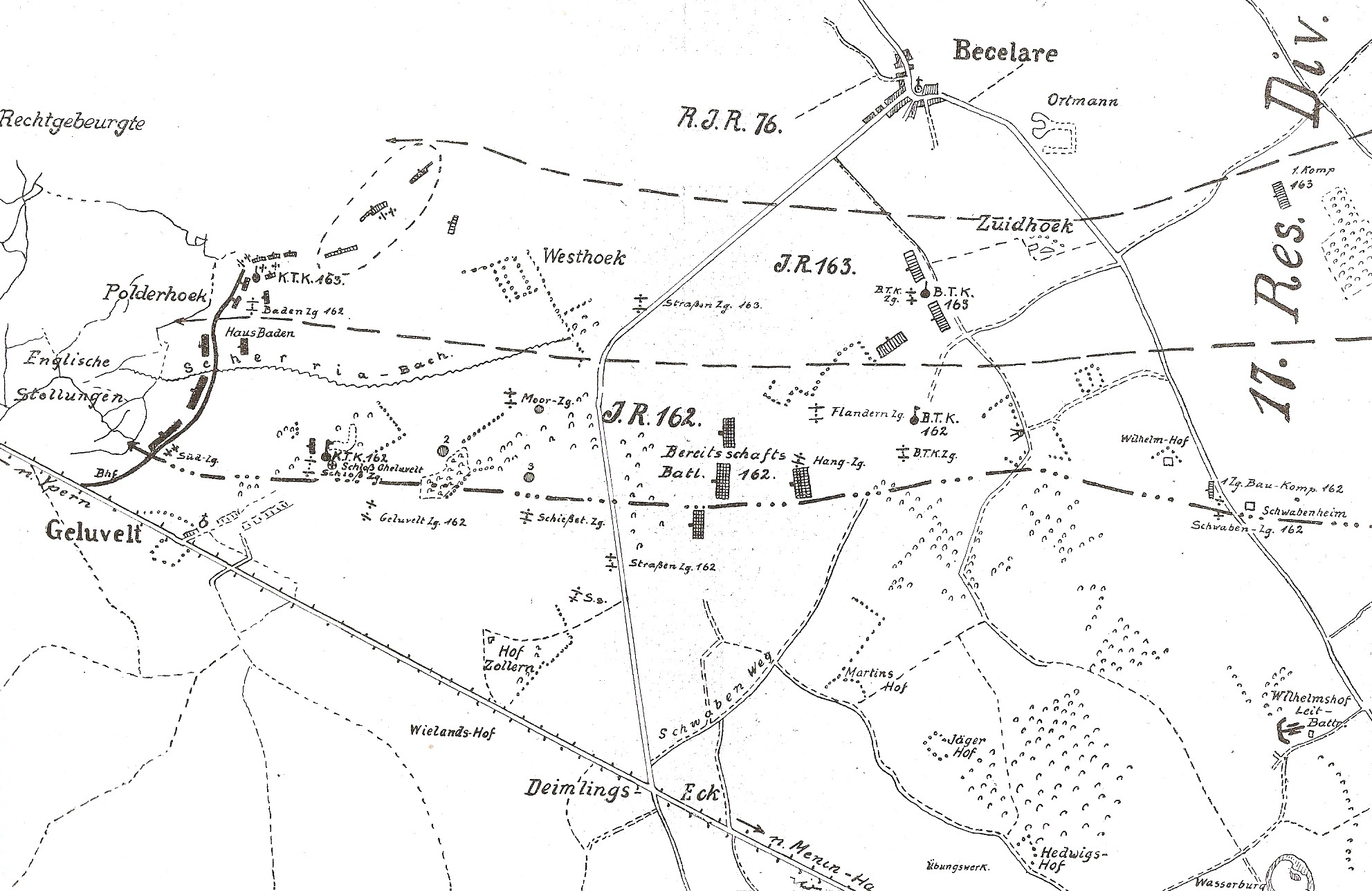 Stellung bei Geluvelt-Polderhoek